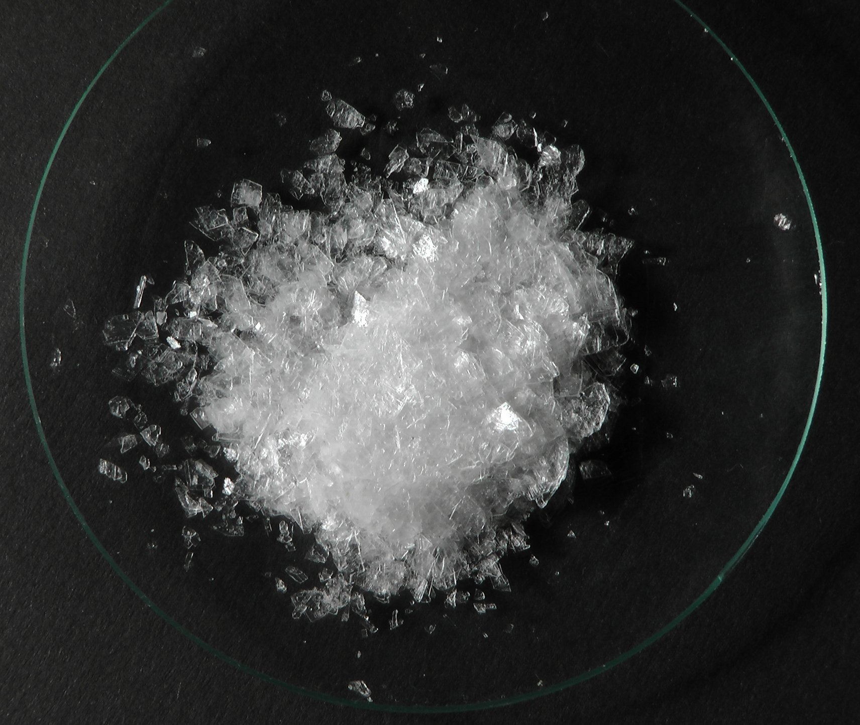 Grobkristallines Kaliumchlorat (Durchmesser ca. 0,5–5mm)